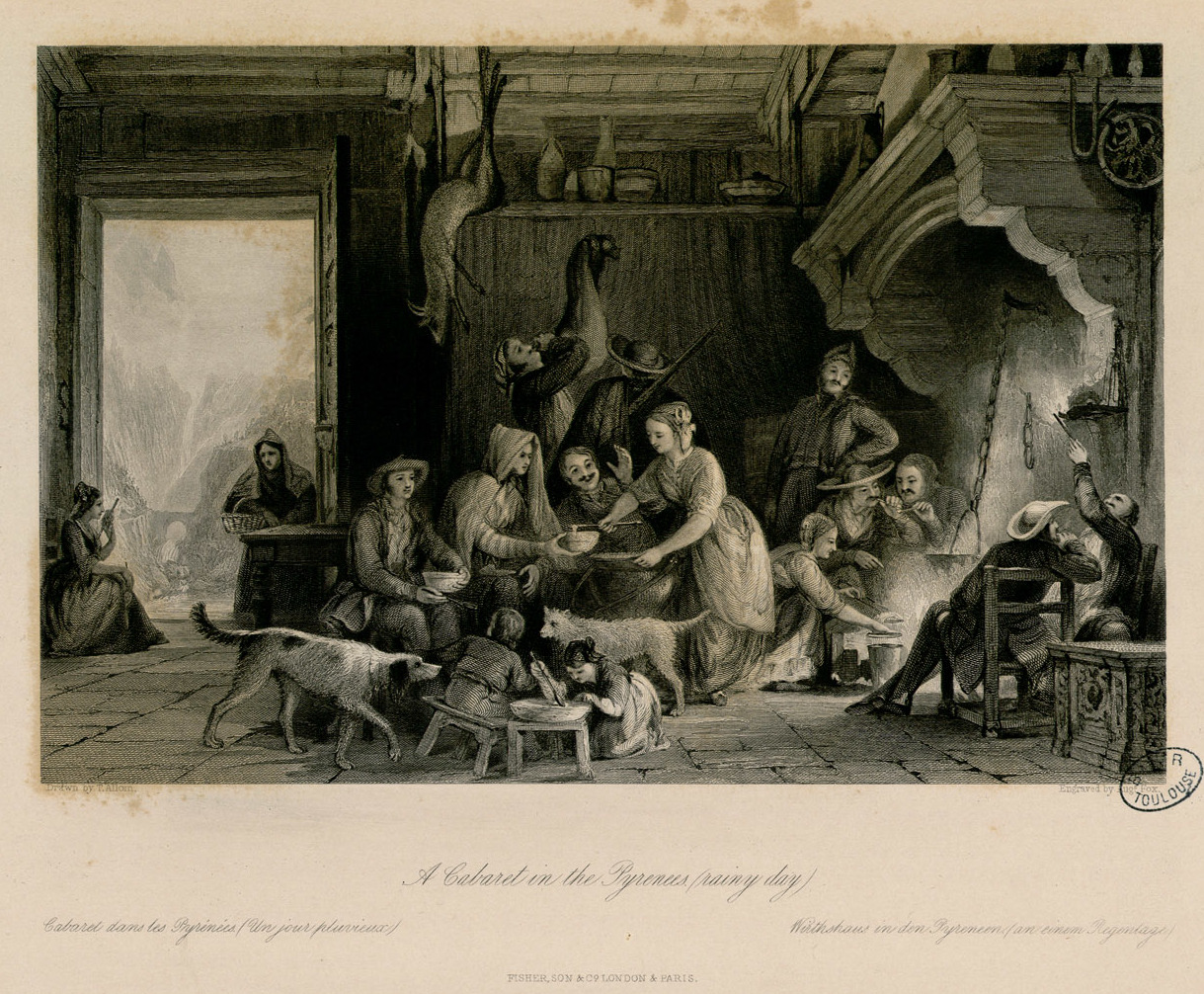 Extrait des trois volumes de "La France au XIXe siècle" de Thomas Allom, qui contient 19 planches concernant les Pyrénées (pl. 45, 49, 55, 62, 68, 75, 78, 80, 81, 83 (Tome II) et 5, 7, 16, 37, 42, 45, 65, 83, 85 (Tome III). Dans chaque tome le faux titre est gravé sur acier et rédigé en anglais. Les planches pyrénéennes ont souvent été réunies en albums, sans texte. Cet exemplaire réunit 22 gravures sur acier en noir et blanc concernant les Pyrénées et Toulouse. - Planches séparées Gravures exécutées par A. Willmore, C. T. Dixon, E. Radclyffe, J. Kernot, W. Floyd, R. Wallis, S. Fischer, J. C. Bently, H. Adlard, Augs. Fox, J. Templeton, S. Bradshaw, J. Tingle, T. Turnbull, J. Carter, d'après les dessins de T. Allom Ancely, René (1876 - 1966). Possesseur